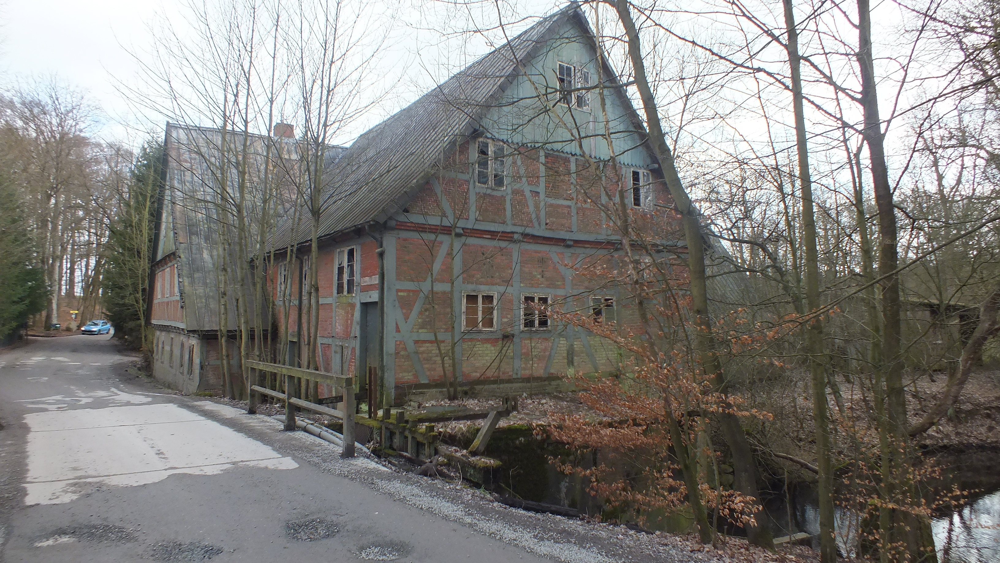 Seppenser Mühle